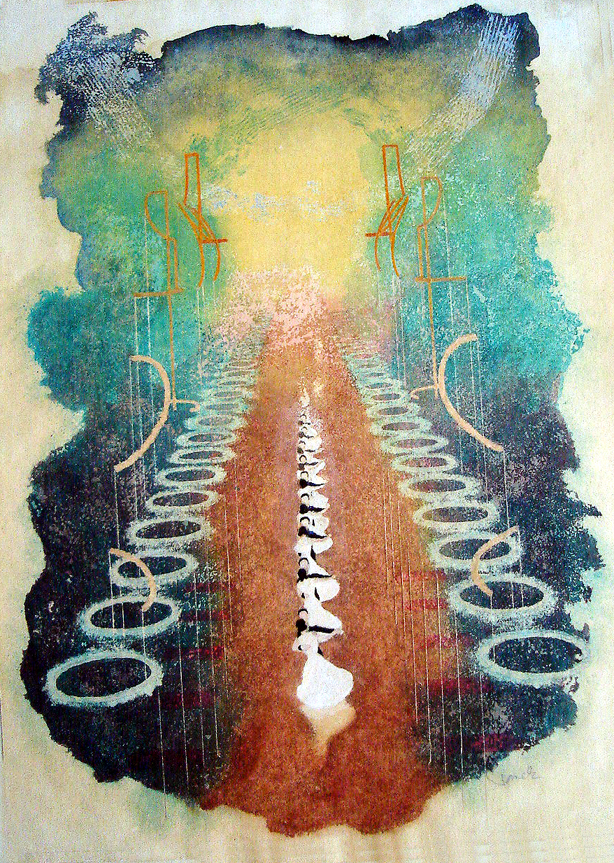 Serenáda č. 2 od Petra Iljiče Čajkovského